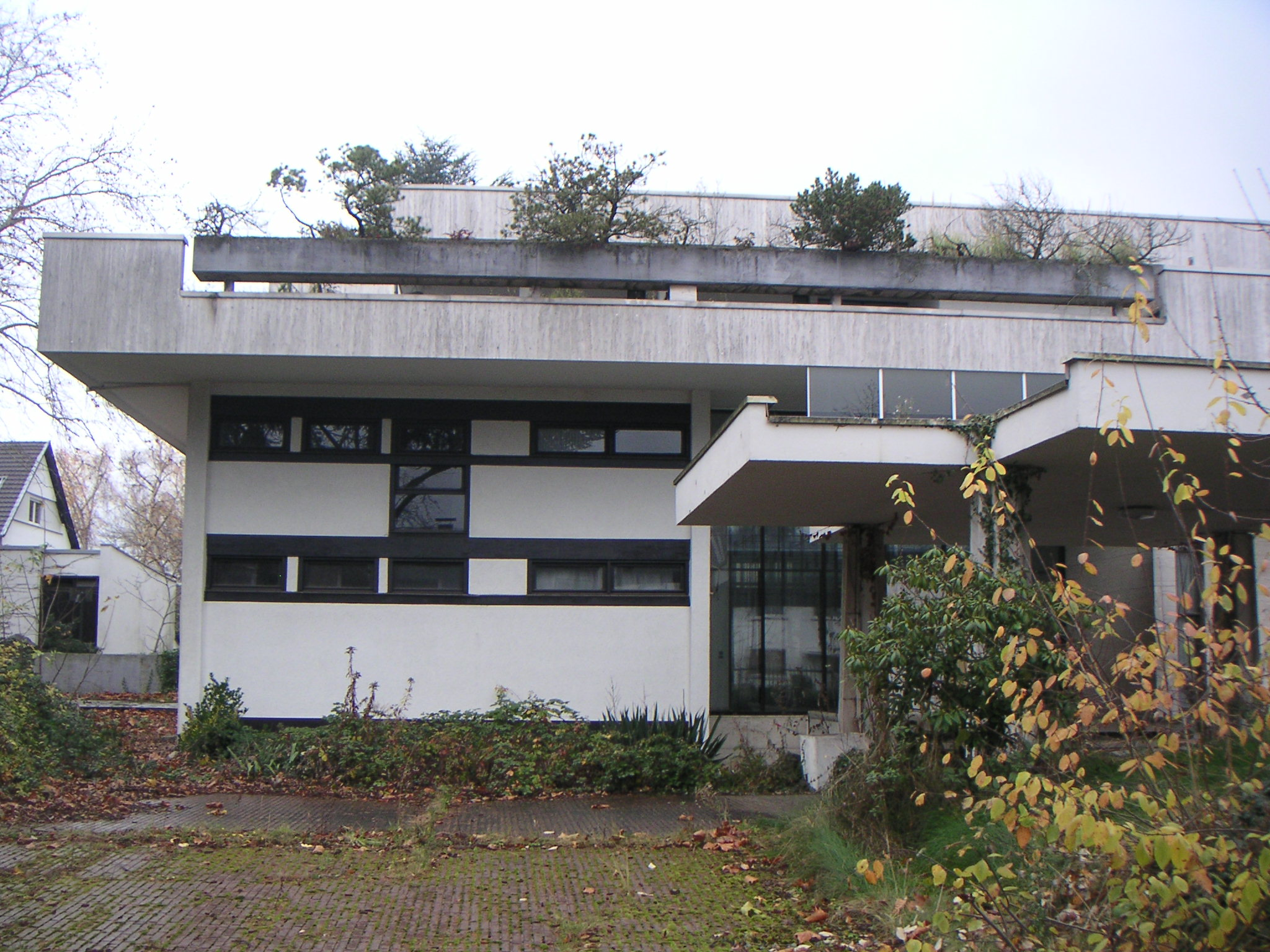 Ehemalige türkische Botschaft in Bonn-Mehlem, Utestraße 47/ Gernotstraße 5: Residenzgebäude (2012 Verkauf und Abriss und später Bau von Eigentumswohnungen auf dem Grundstück)